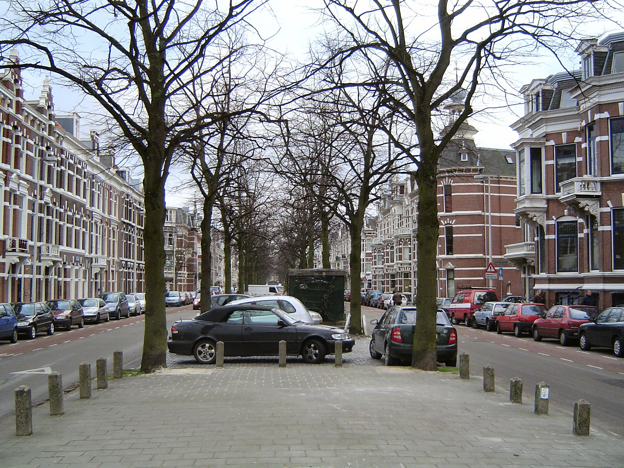 Den Haag, Netherlands Regentesselaan vanaf Laan van Meerdervoort, Regentessekwartier, author: Frank Kam Dec 27, 2005